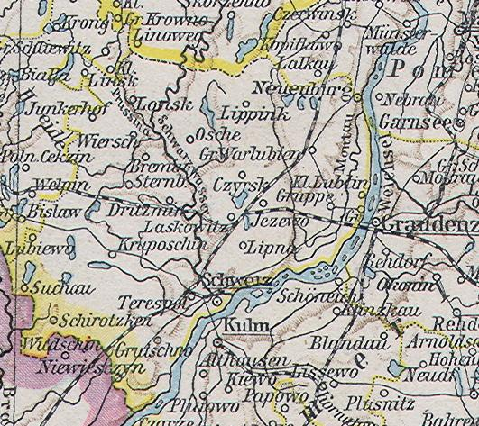 Karte:Kreis Schwetz, Ausschnitt aus File:Ost-_und_Westpreussen.jpg